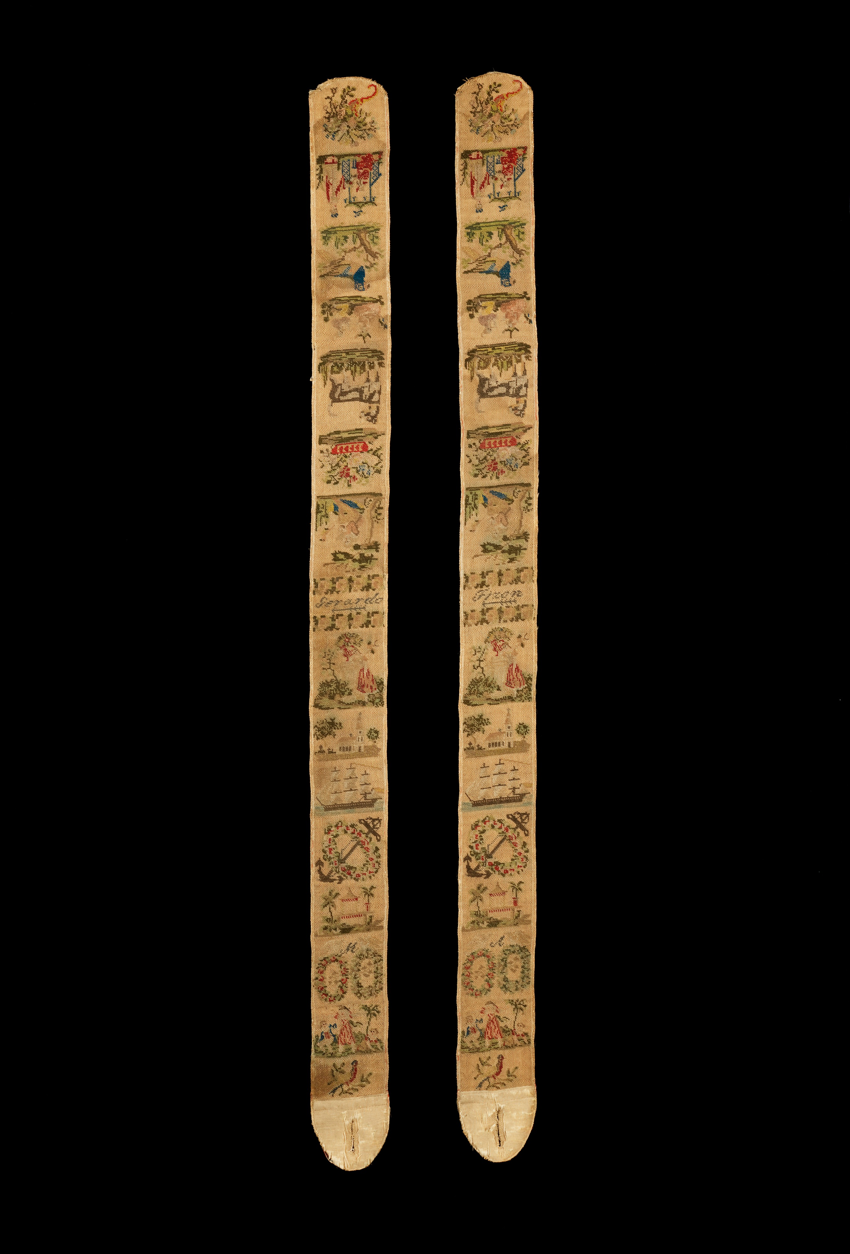 Portuguese; Suspenders